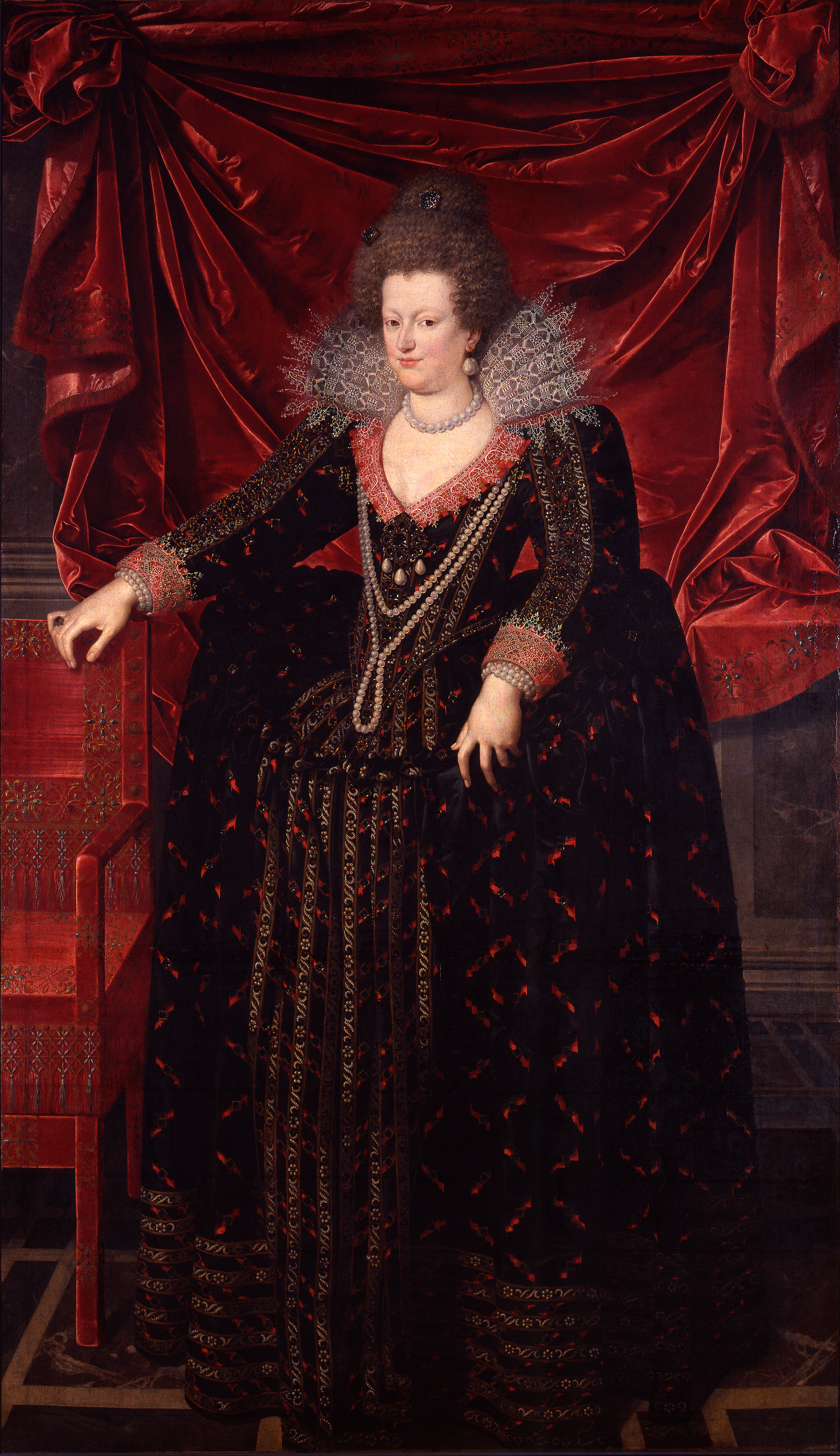 Retrato de la reina María de Médici (1575-1642), que fue reina consorte de Francia por su matrimonio con el rey Enrique IV de Francia y era hija de Francisco I de Médici, gran duque de Toscana, y de Juana de Habsburgo-Jagellón.